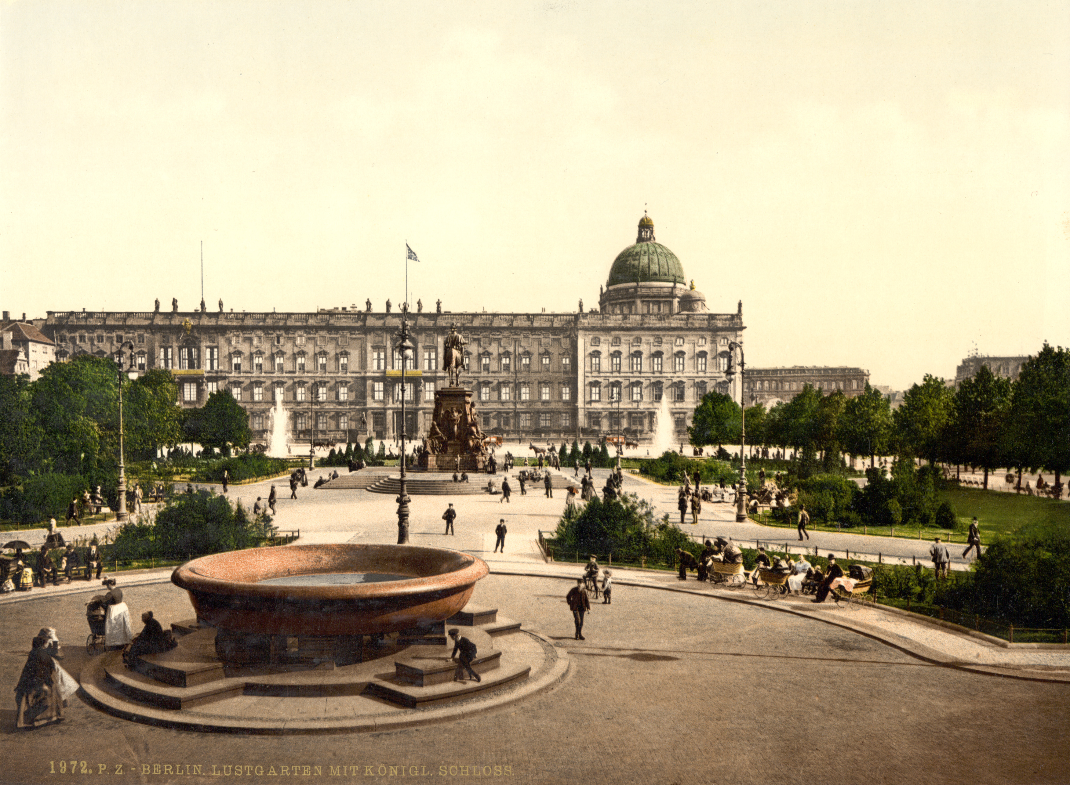 Berliner Stadtschloss zwischen 1890 und 1900